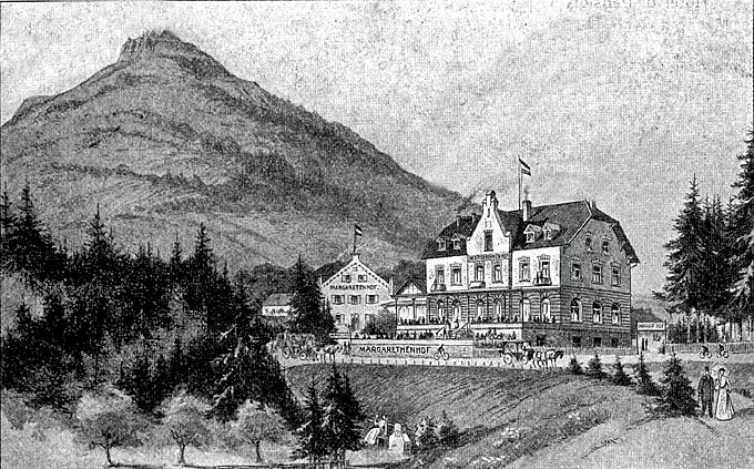 Margarethenhof (vorne) und Margarethenkreuz (hinten), Ittenbach: Postkarte